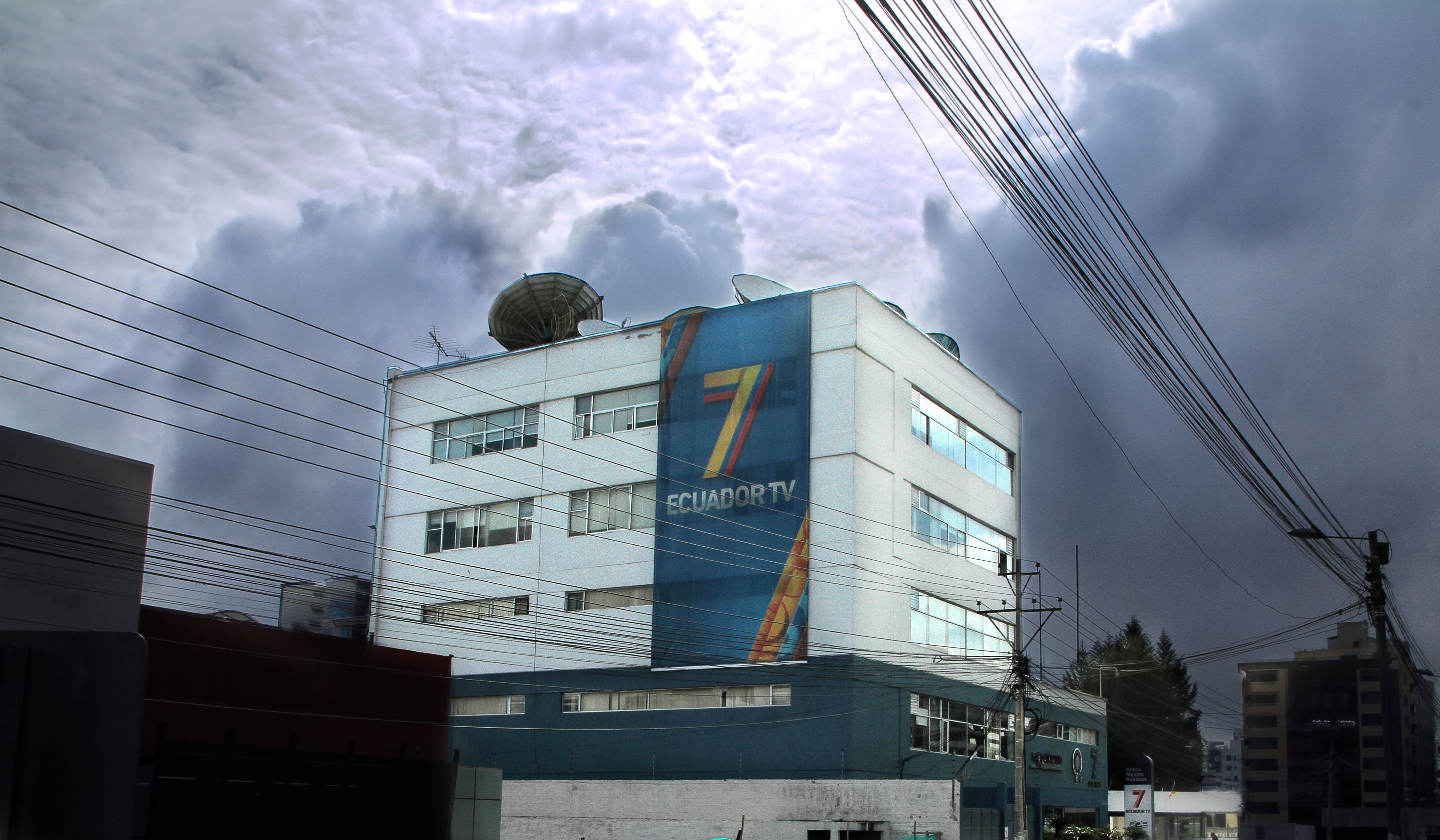 Ecuador TV. Fachada del edificio de médios públicos. Quito, 26 nov (Andes) foto: Carlos Rodríguez L./Andes